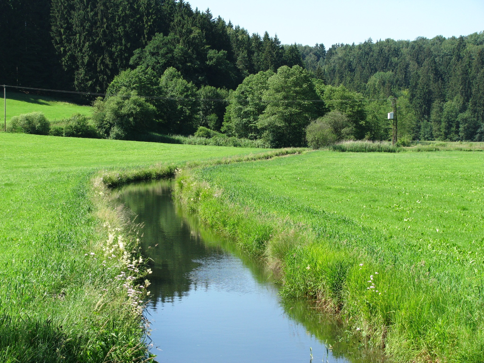 Kupferbach südlich von Reisenthal, Gemeinde Glonn, kurz nachdem er das Naturschutzgebiet Kupferbachtal bei Unterlaus verlassen hat